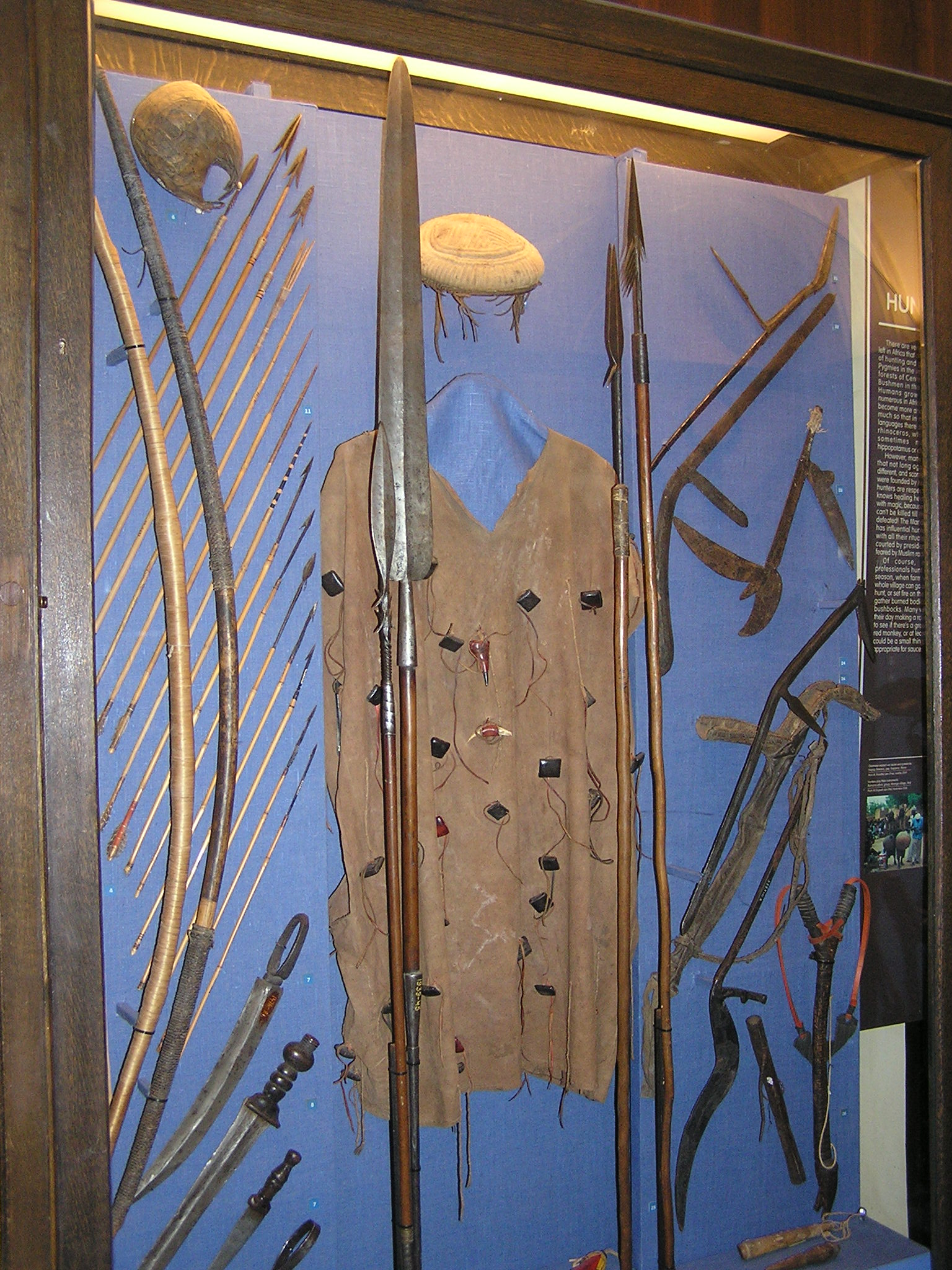 Санкт-Петербург. Музей антропологии и этнографии имени Петра Великого Российской академии наук (Кунсткамера). Оружие